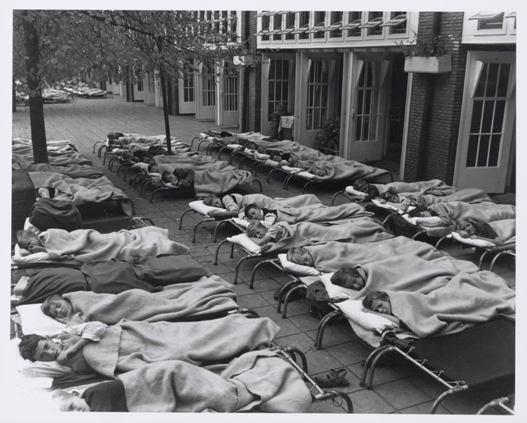 Openluchtschool Oosterpark, kinderen slapen buiten, 4 oktober 1950 Foto Ben van Meerendonk / AHF, collectie IISG, Amsterdam